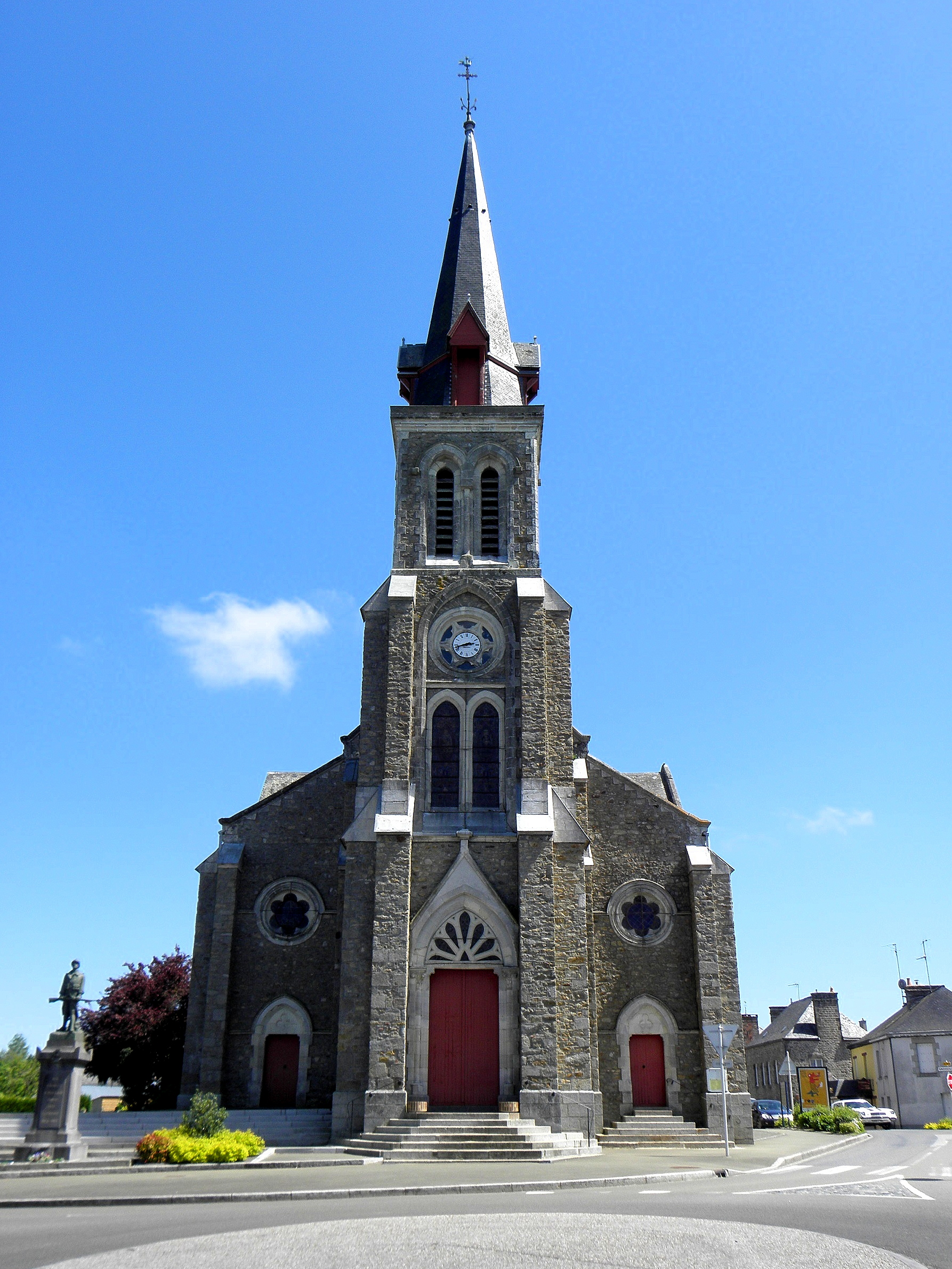 Église Notre-Dame de l'Assomption d'Alexain (53). Architecte : Lemesle. Construction : 1862-1864.